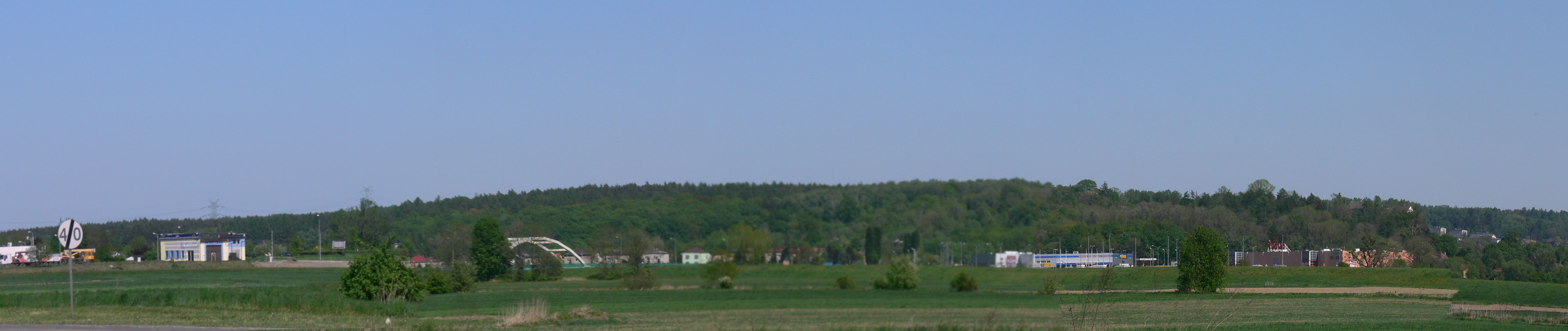 Racibórz - widok na Arboretum Bramy Morawskiej